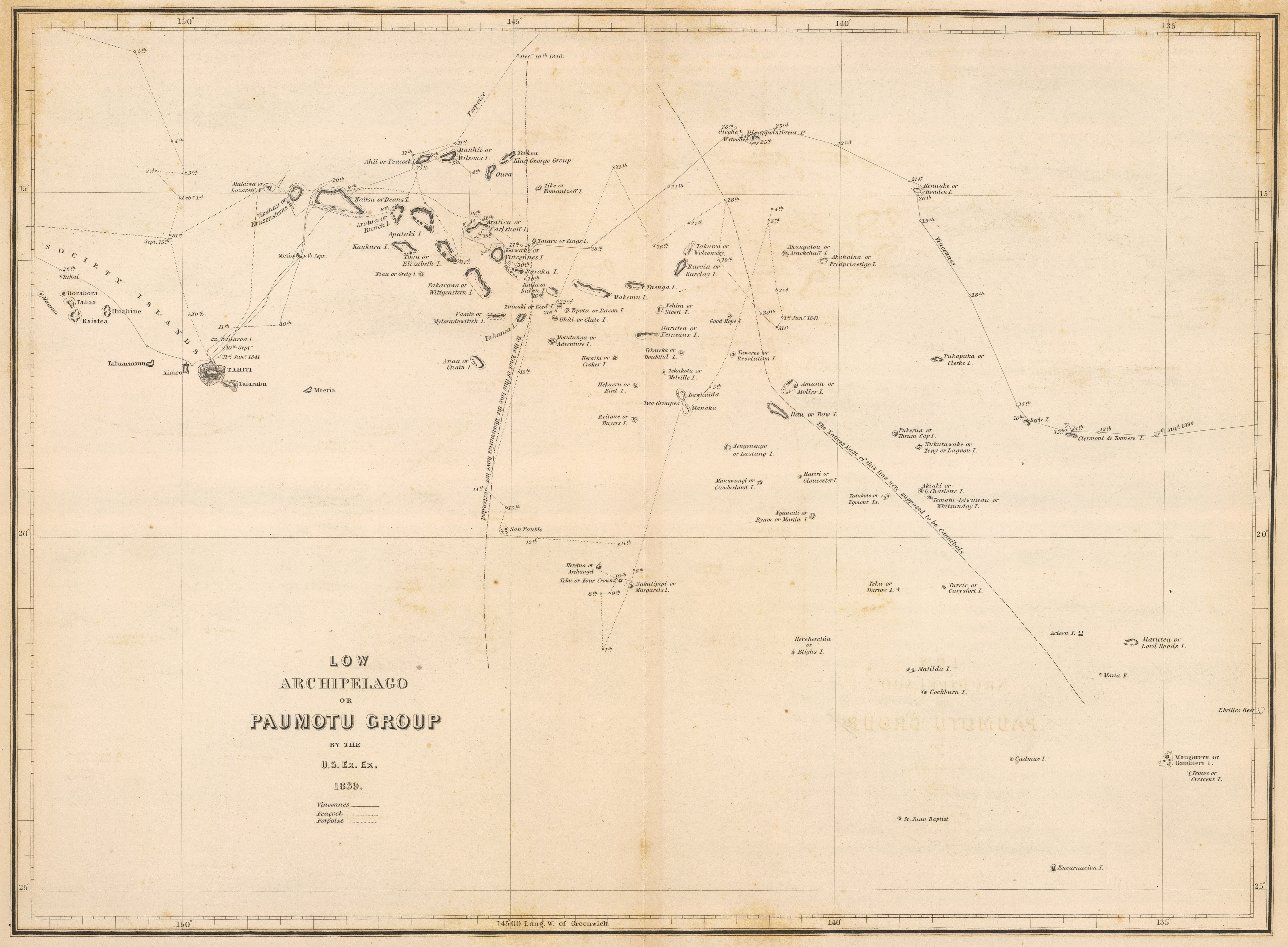 Карта движения кораблей экспедиции Уилкса через архипелаг Туамоту.